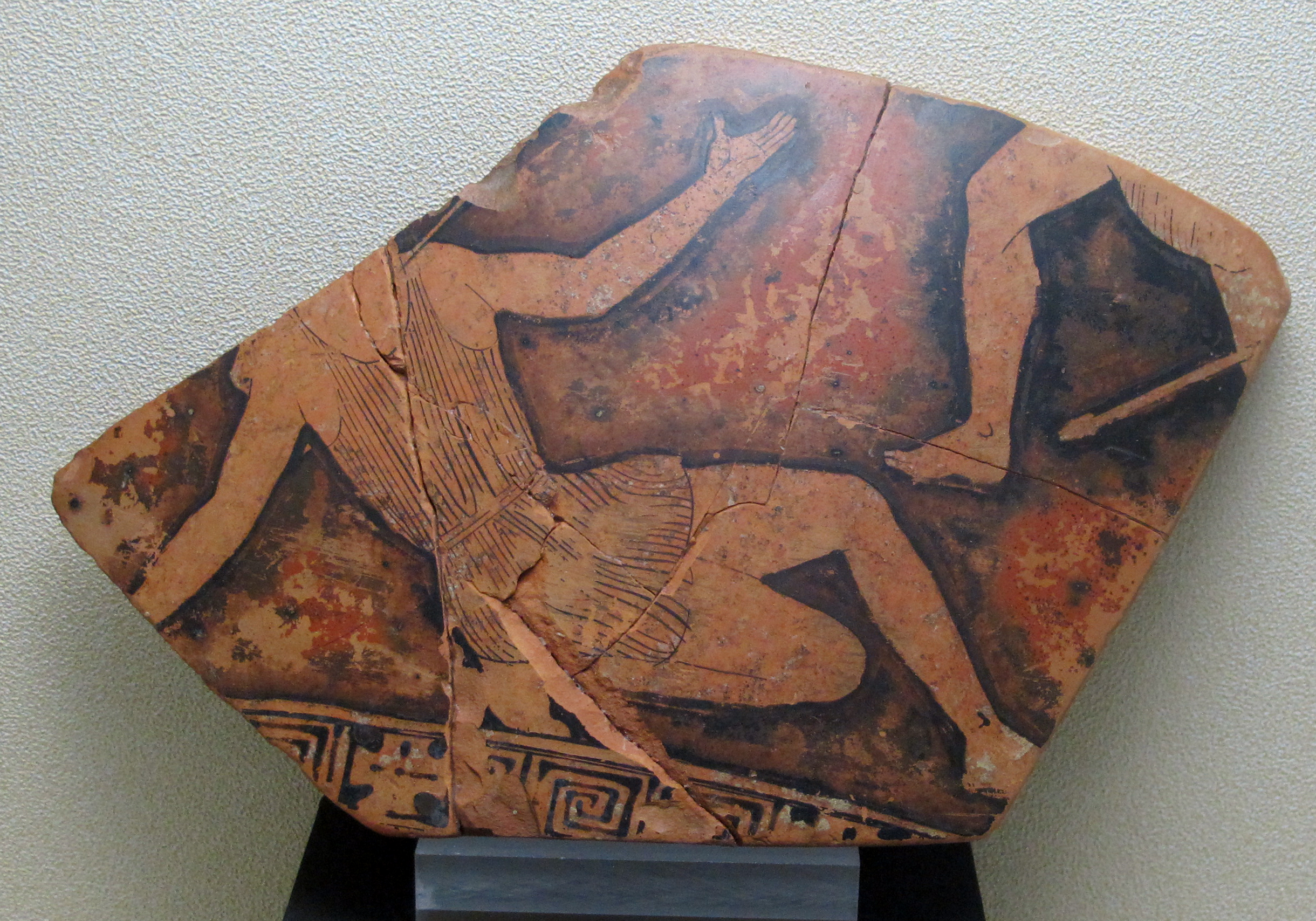 Frammento di cratere attico a figure rosse copn amazzonomachia, da s.marina di focara (pesaro), V sec ac.